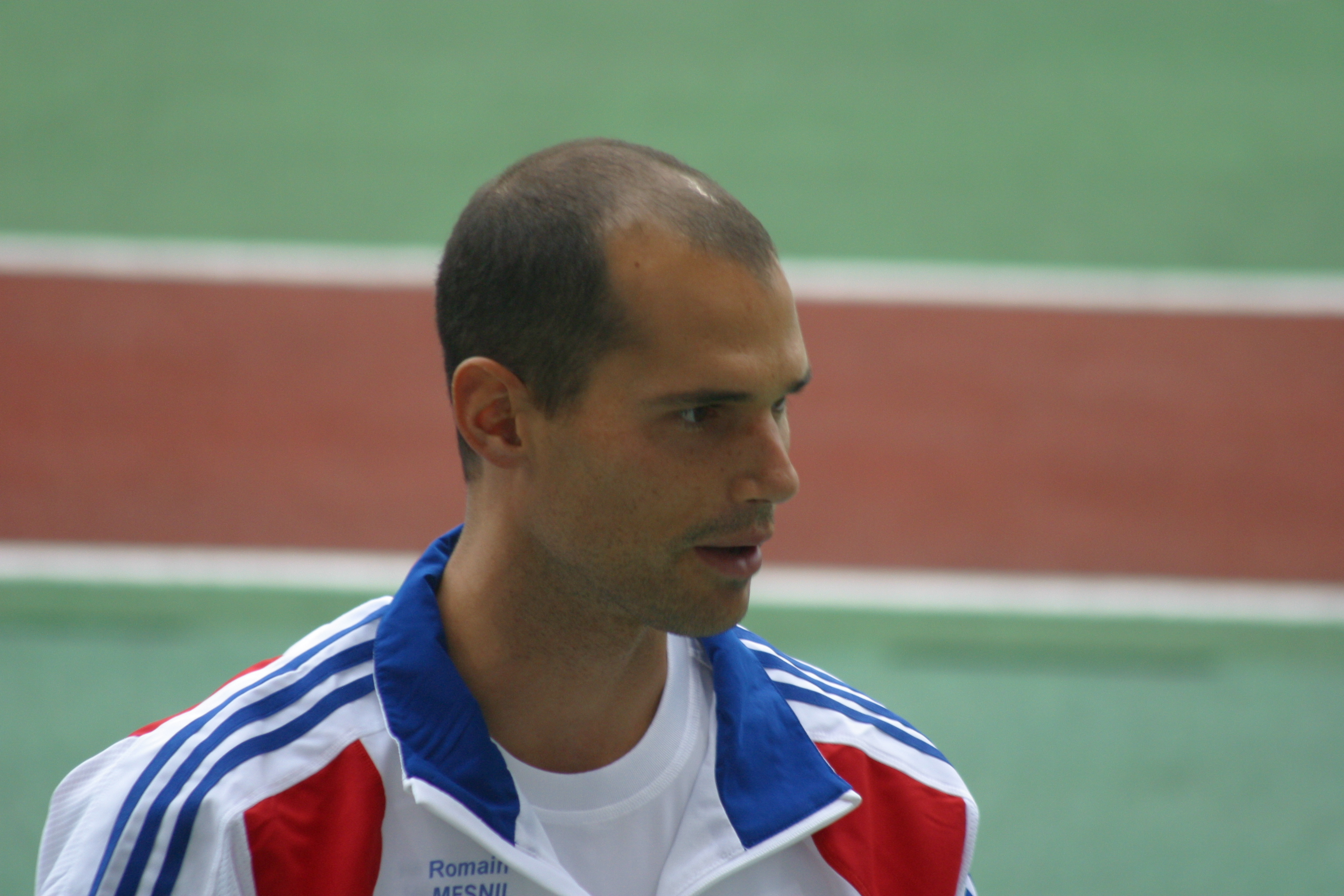 Romain Mesnil aux decanation 2009